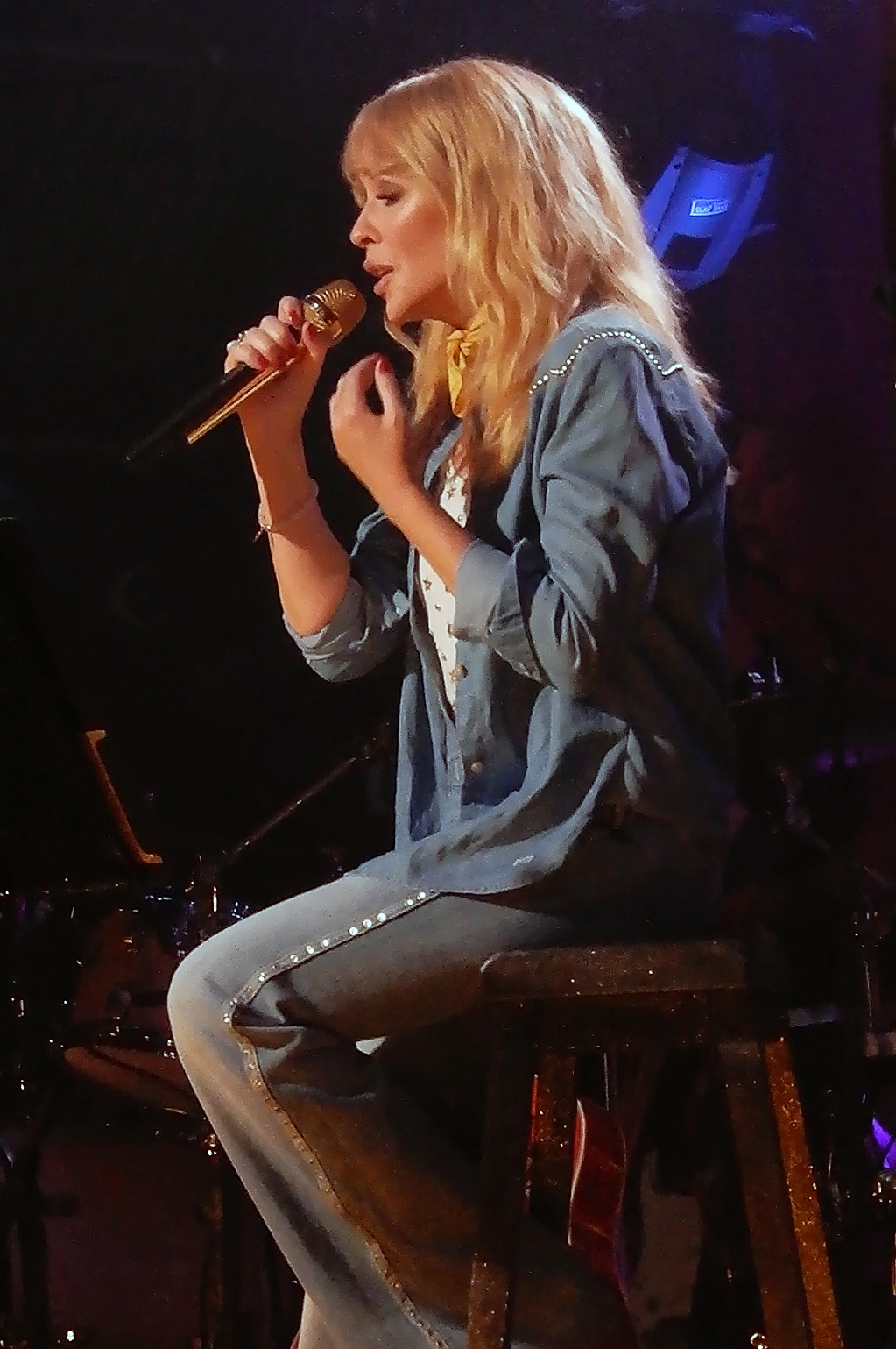 Kylie Minogue - Kylie Presents Golden Tour - Gorilla - Manchester - 14.03.18 - 075